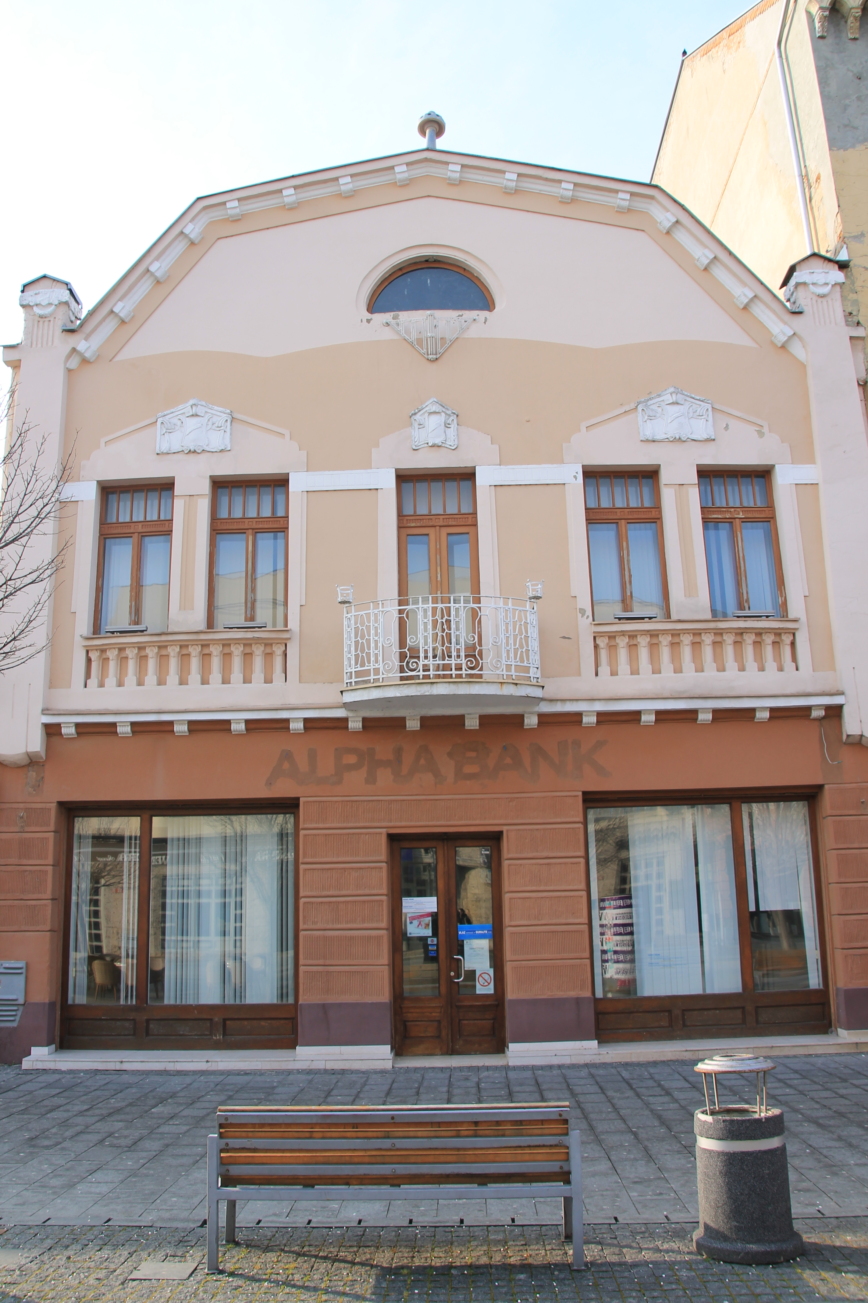 Staro jezgro Zrenjanina